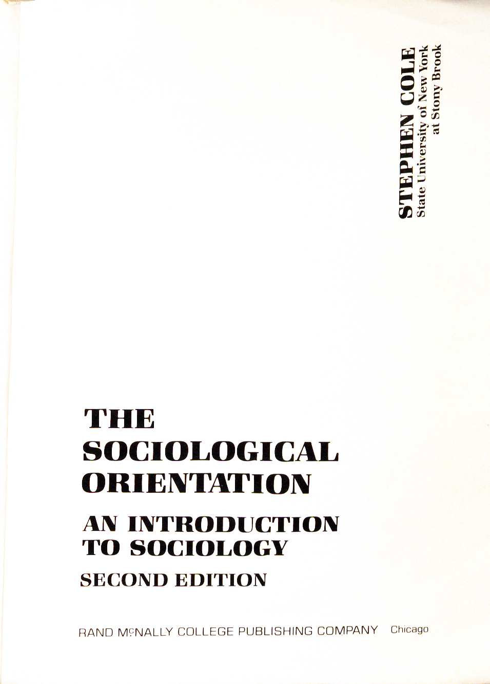 Stephen Cole The Sociological Orientation 2. Auflage 1979